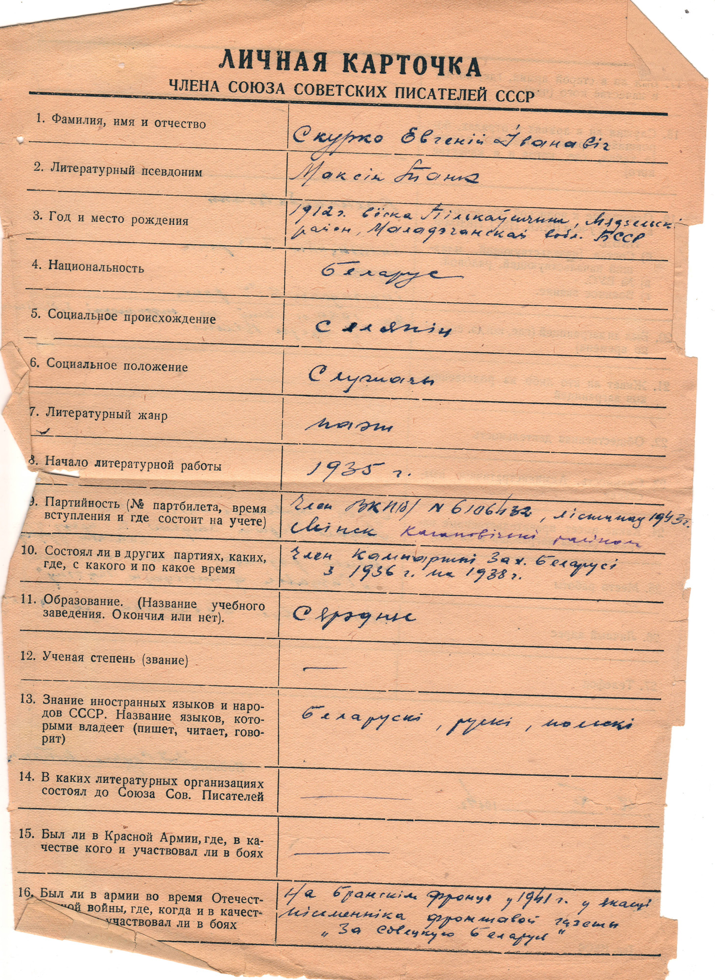 Асабістая картка сябра Саюза савецкіх пісьменнікаў СССР, запоўненая ўласнаручна Максімам Танкам. 1950-я